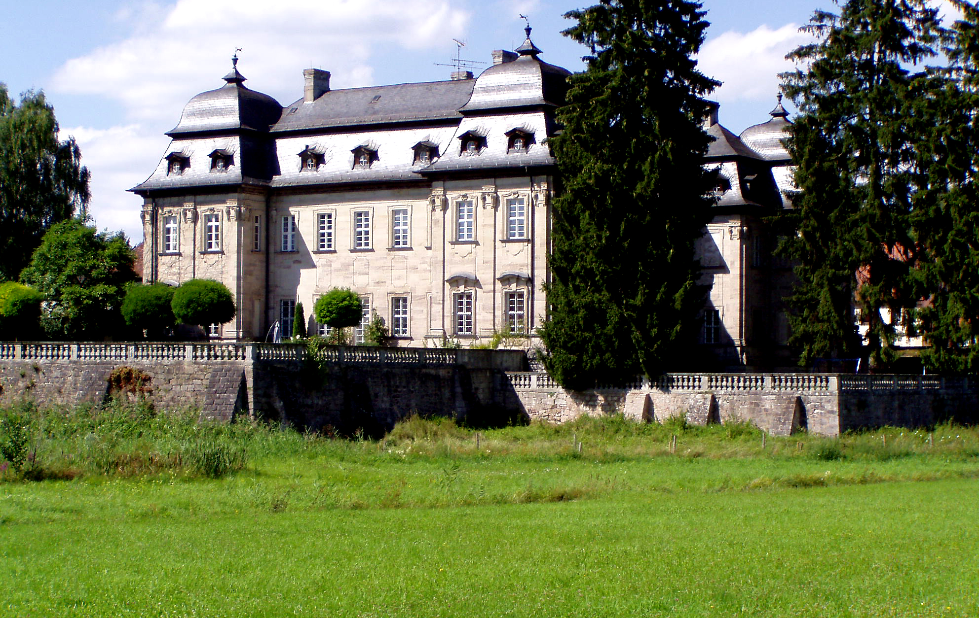 Amtsschloss Burgwindheim der Zisterzienserabtei Ebrach